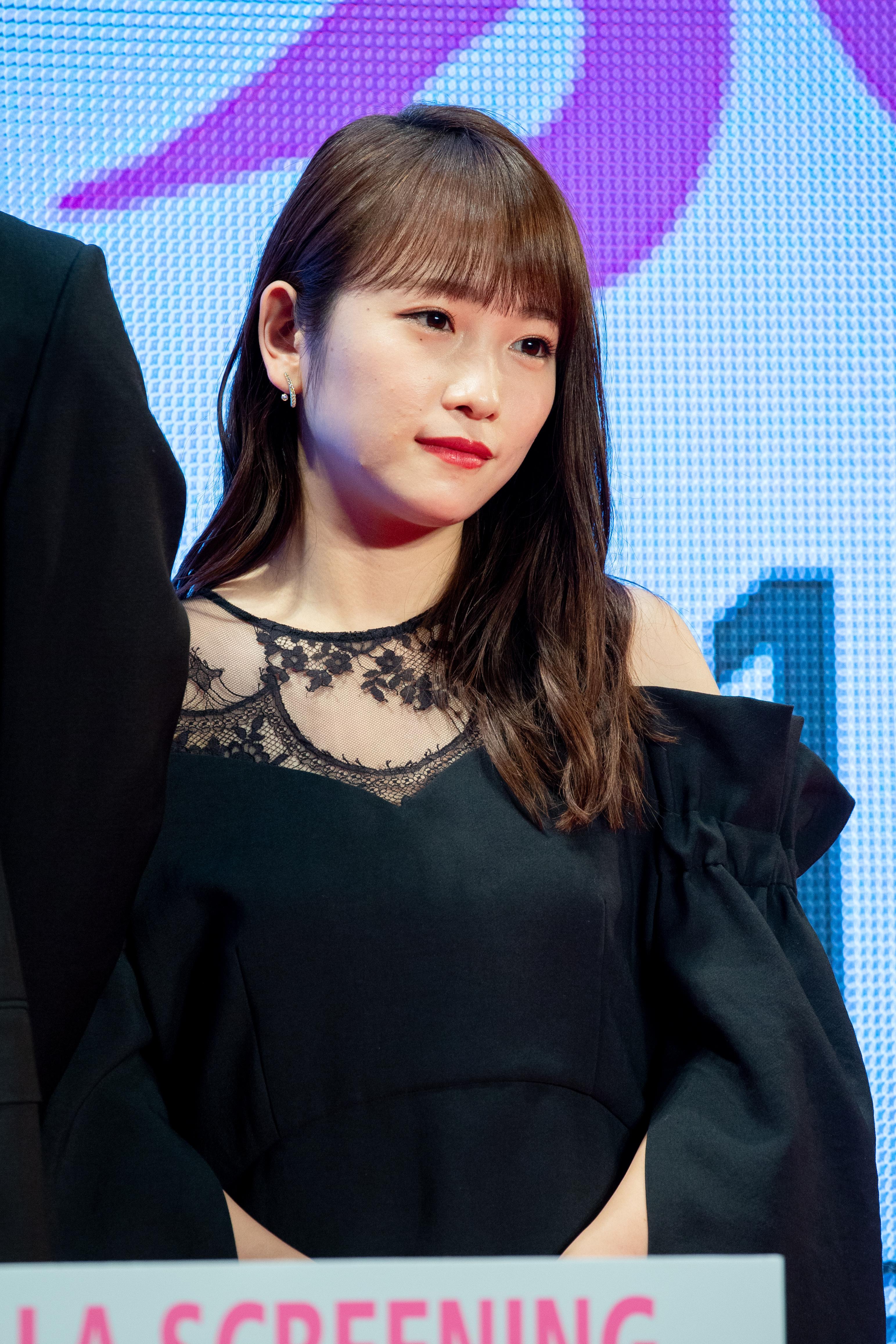 第30回 東京国際映画祭 人魚の眠る家 レッドカーペットイベント 川栄李奈